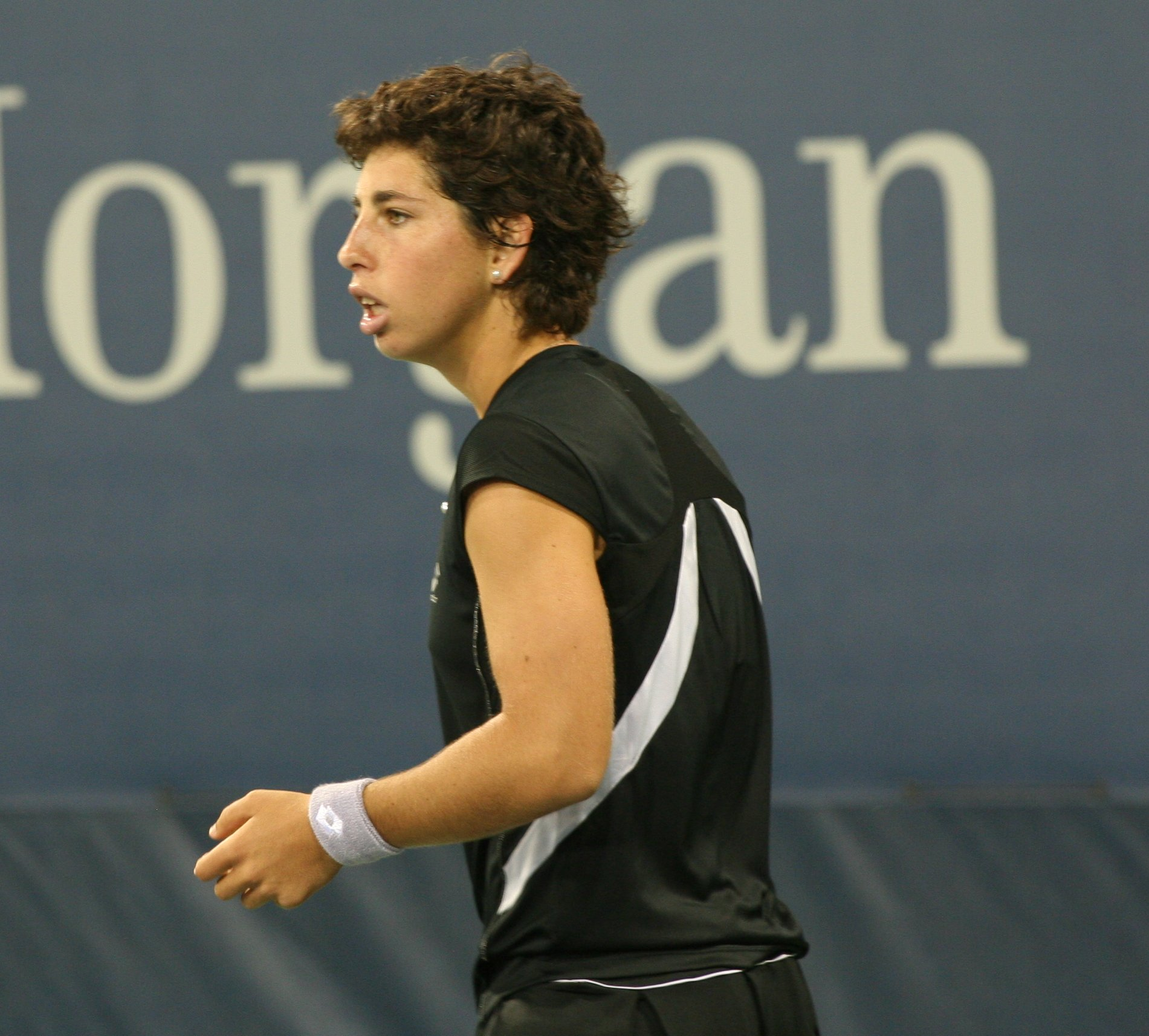 U.S. Open Wednesday, Sept. 2, 2009